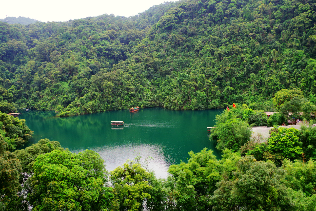 鼎湖山-鼎湖